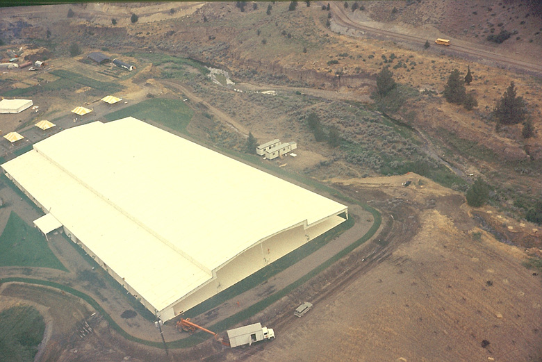 Mandir als grosse Versammlungs- und Zeremonienhalle für Bhagwan und seine Sannyasin in Rajneeshpuram, Oregon. Länge 140 m, Breite 65 m. Jahr:1982